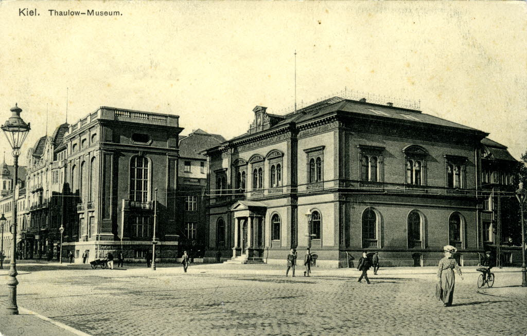 Thaulow-Museum am Sophienblatt 2 (Ecke Ziegelteich)